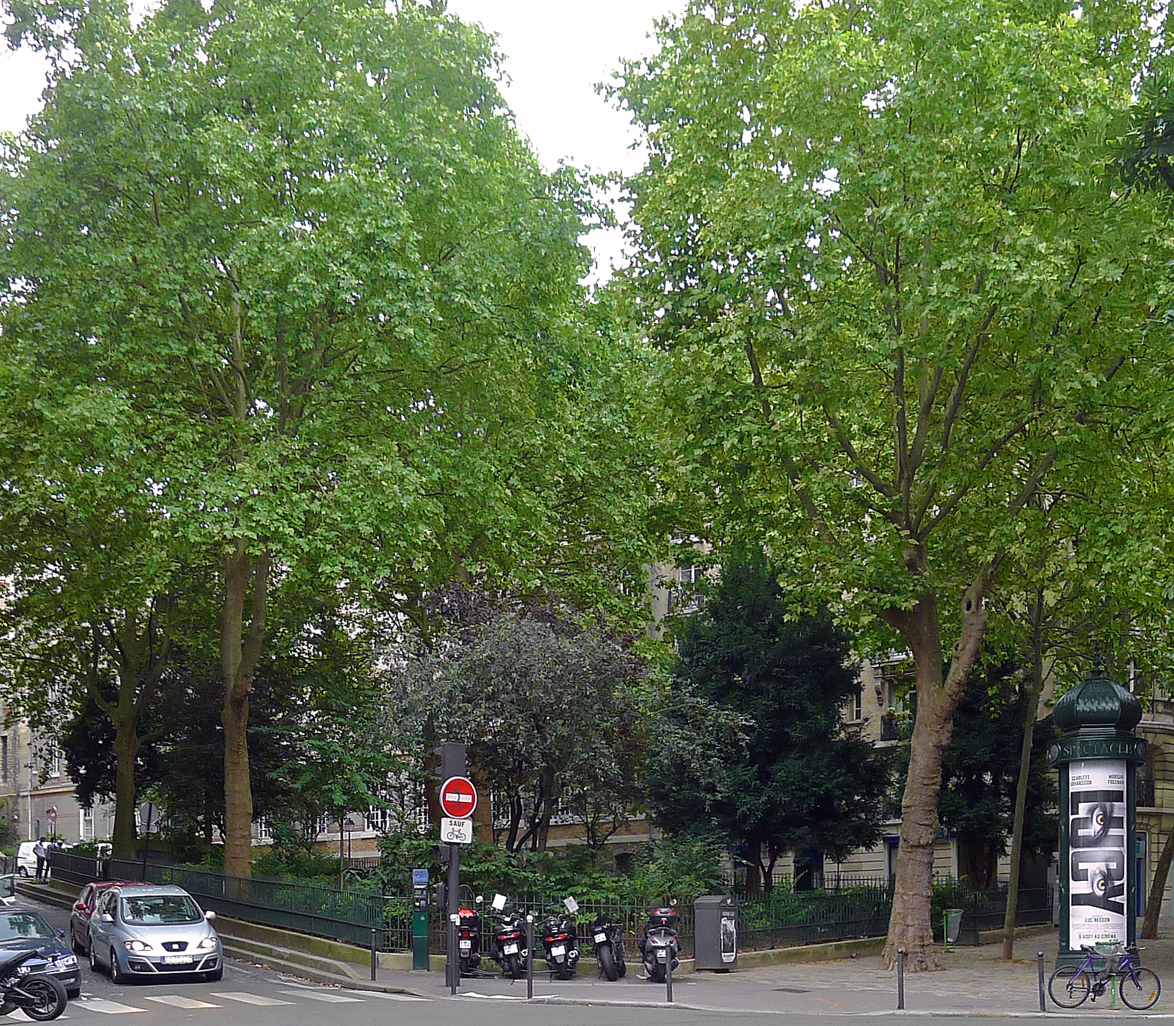 Square Joël Le Tac - Paris XVIII